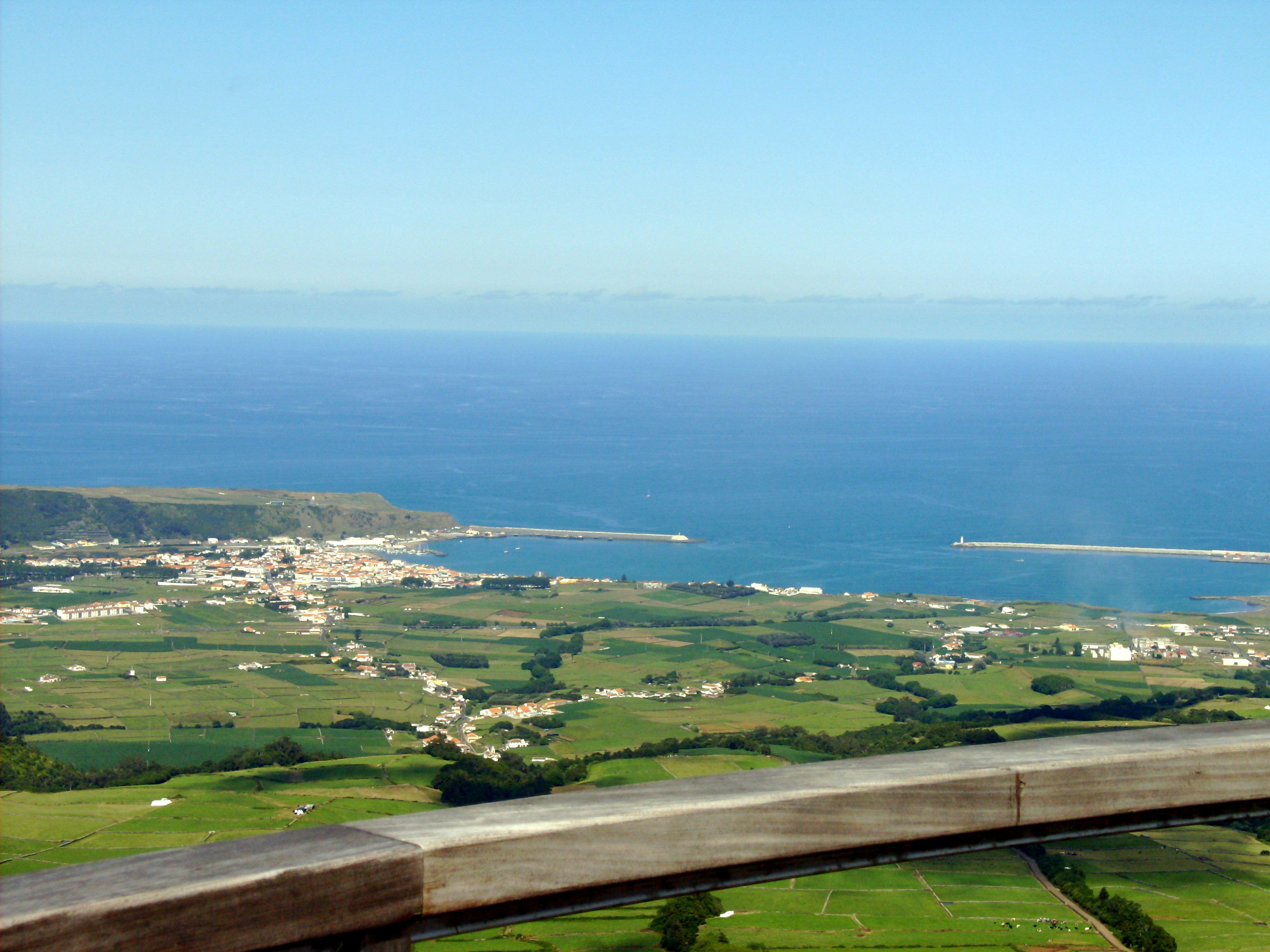 Miradouros da Serra do Cume, Praia da Vitória, ilha Terceira, Açores: Praia da Vitória e sua baía.